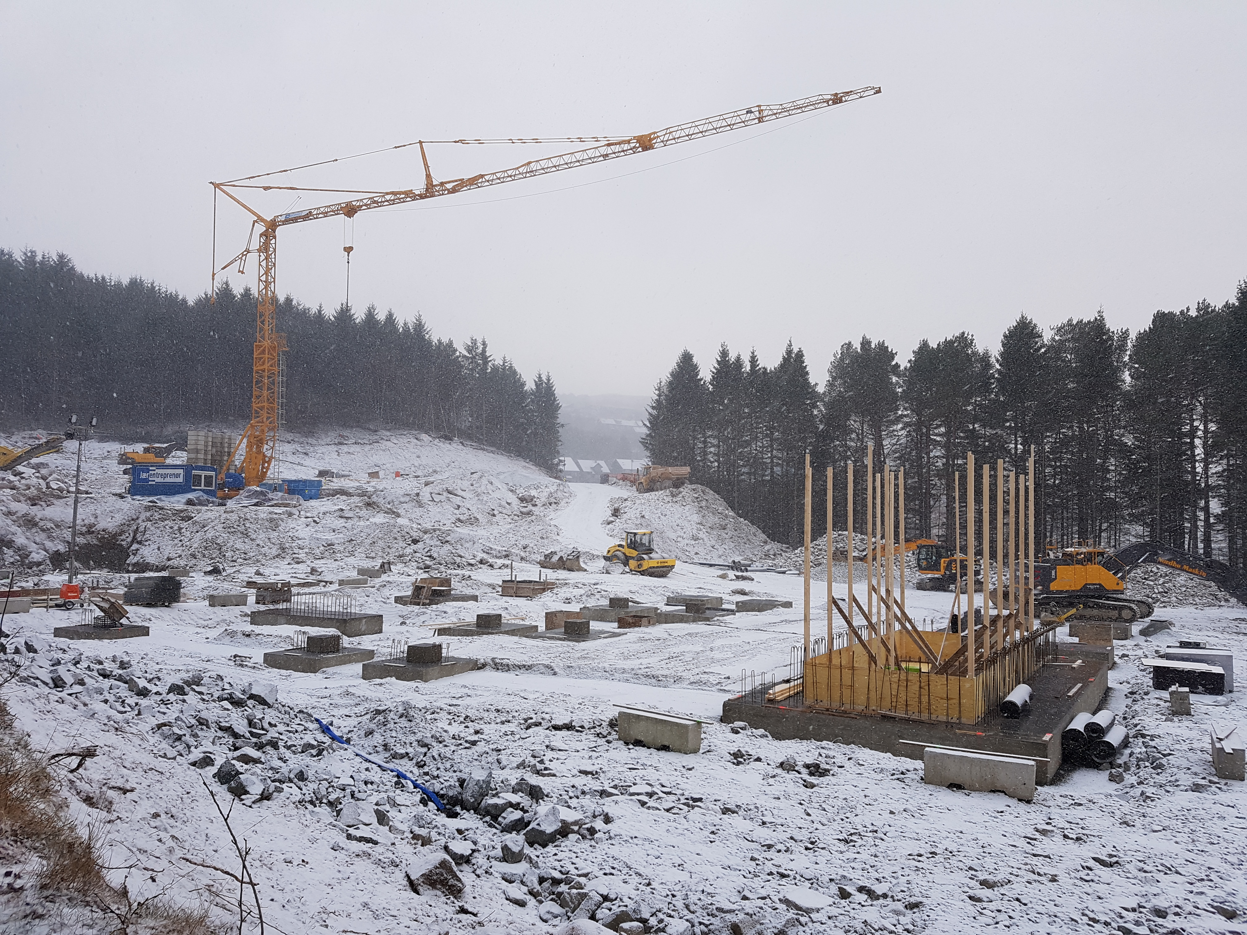 Januar 2019